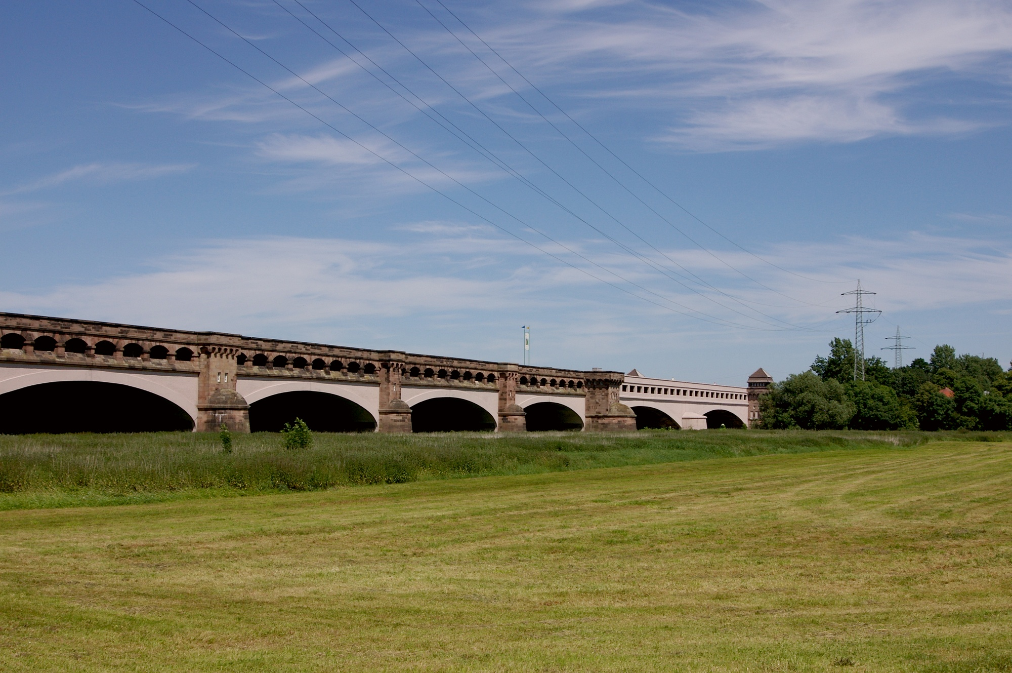 Mittellandkanal bei Minden, Nordrhein-Westfalen. Im Bild ist die alte Fahrt des Wasserstraßenkreuzes Minden abgebildet. Der Kanal wird hier über die Weser (durch die beiden hinteren Pfeiler und nicht direkt sichtbar im Bild) geführt.